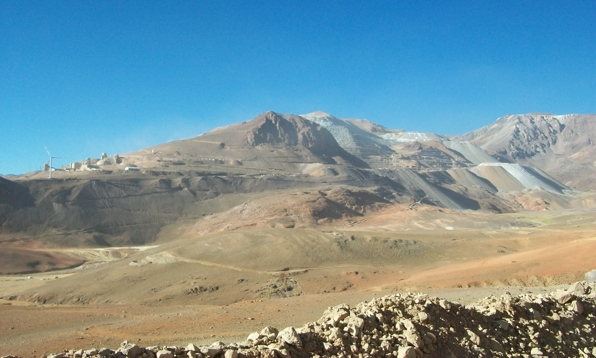 Veladero desde Pascua Lama